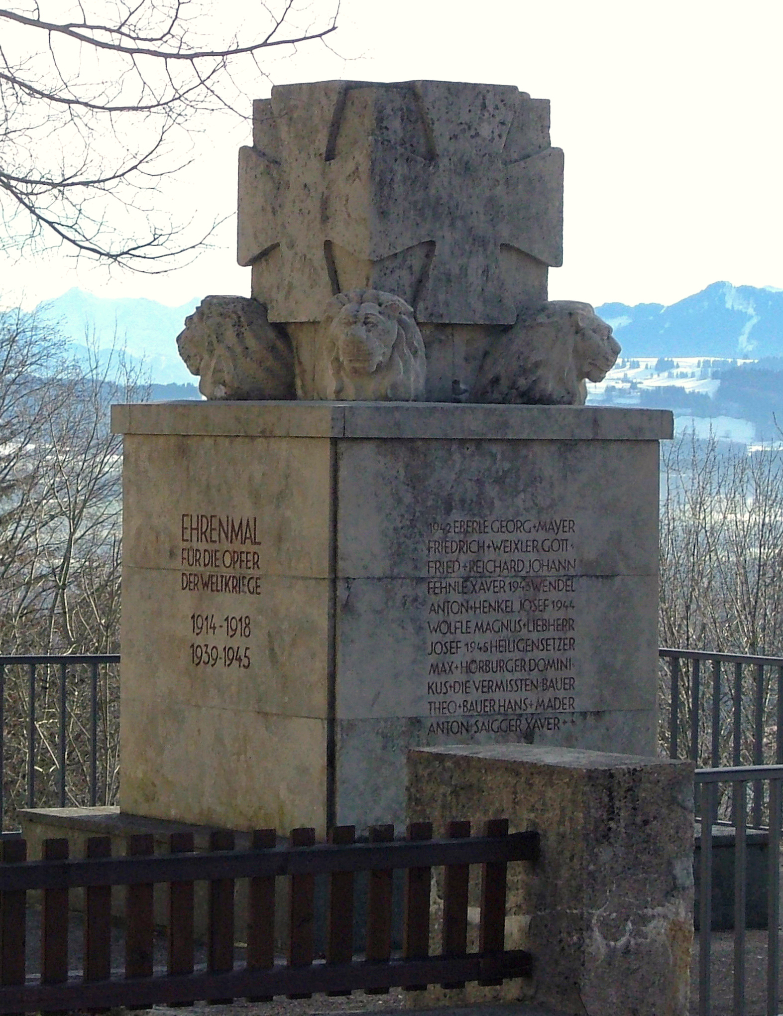 Ehrenmal für die Opfer der Weltkriege auf dem Mariaberg in Kempten, Entwurf: Andor Ákos